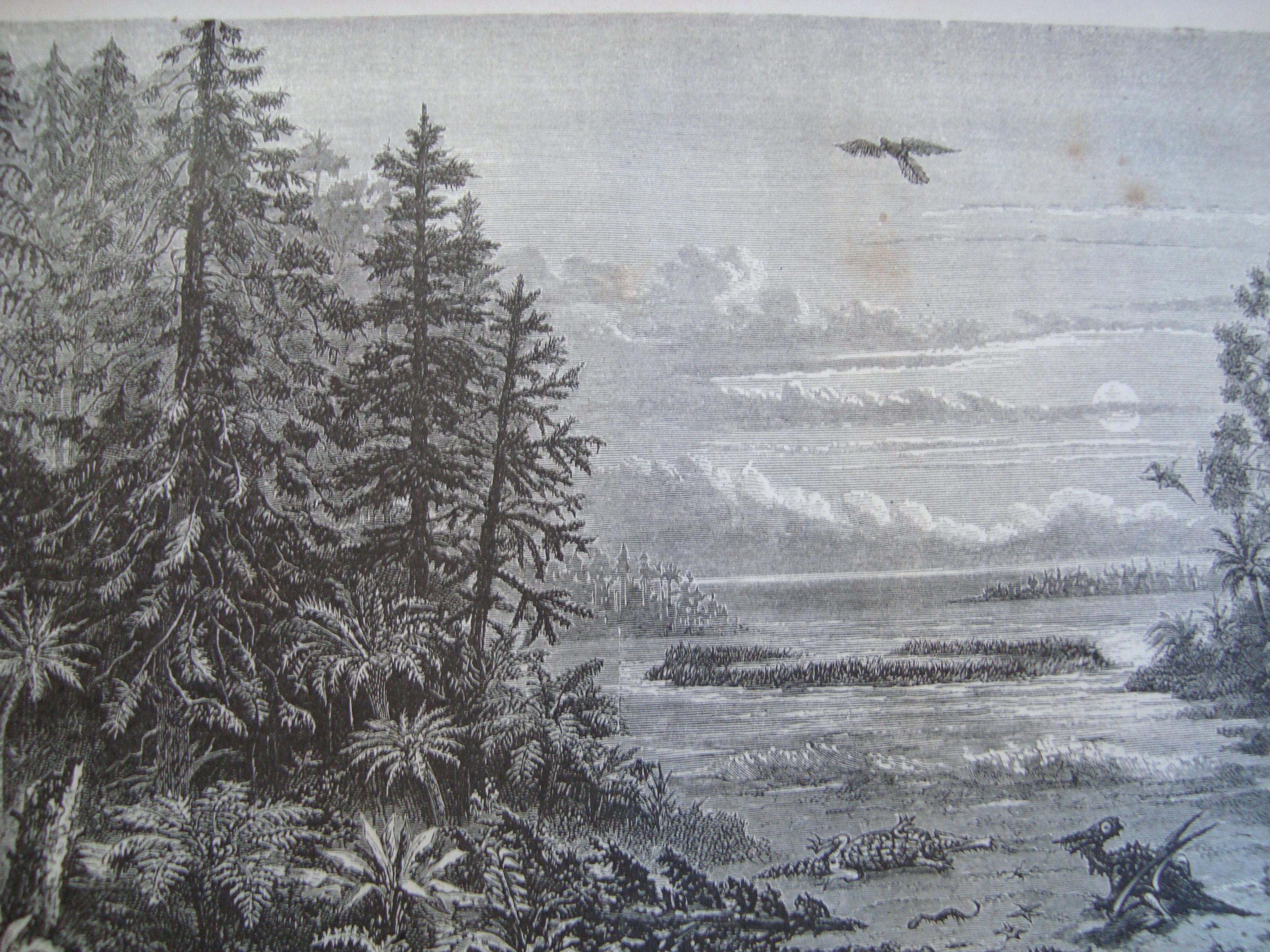 Paysage reconstitué au Jurassique (il y a 146 Ma) avec la même végétation qui devait recouvrir les terres briançonnaises émergées: Conifères, Cycadacées et Araucaria, fougères, Zamites, Pecopteris etc. Dans le ciel: Archaeopteryx, au sol un reptile volant (dessin de Riou in Louis Figuier: la terre avant le Déluge (1872).